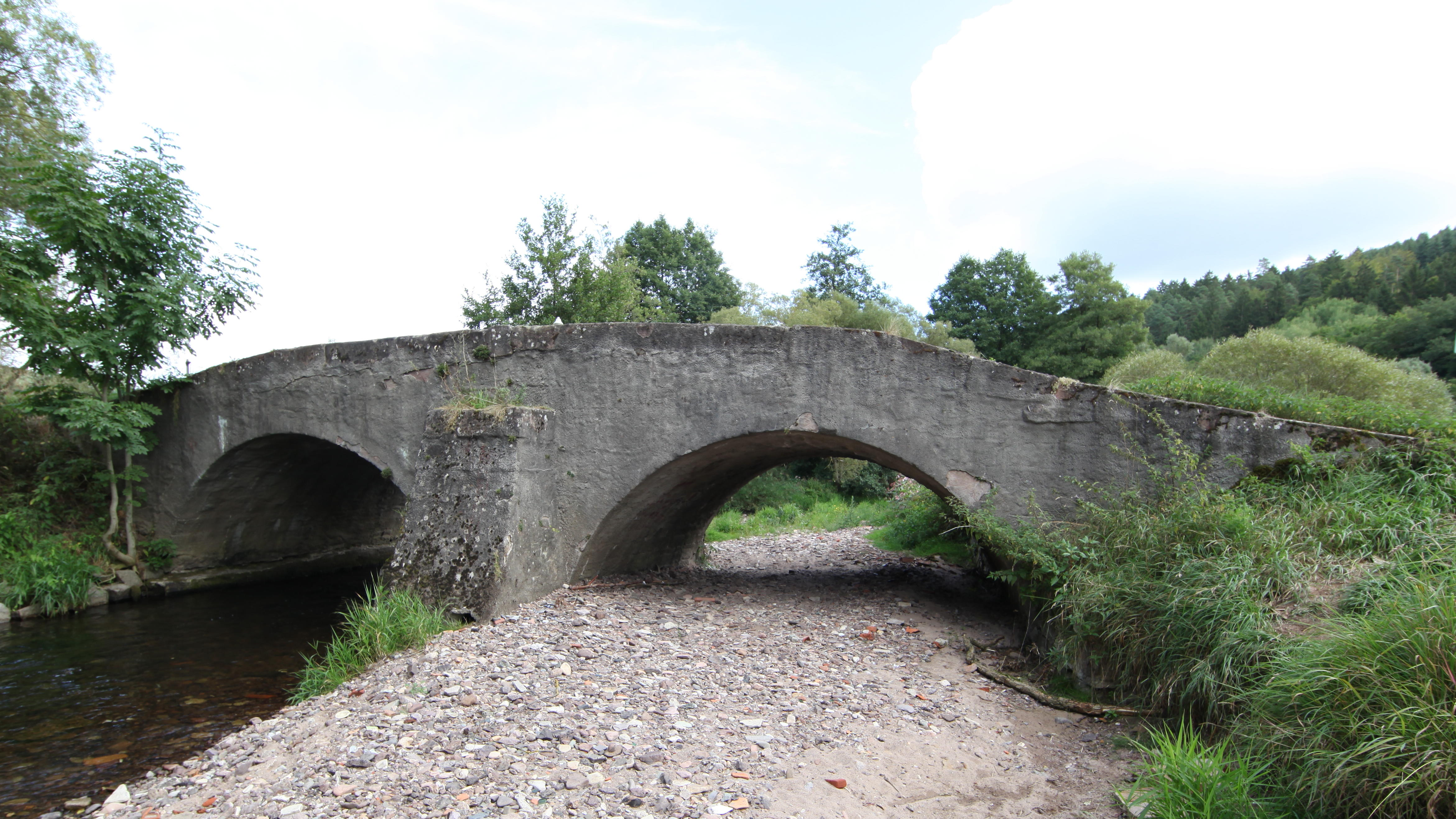 Schwarzabrücke